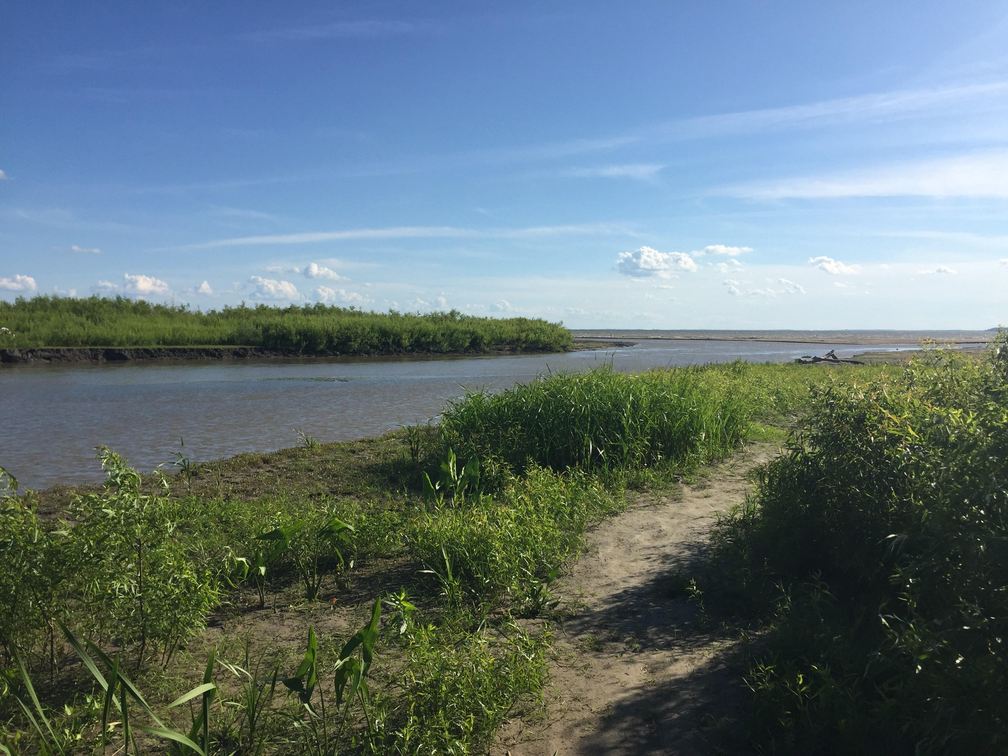 Rivière Yamachiche à son embouchure sur le Lac St-Pierre